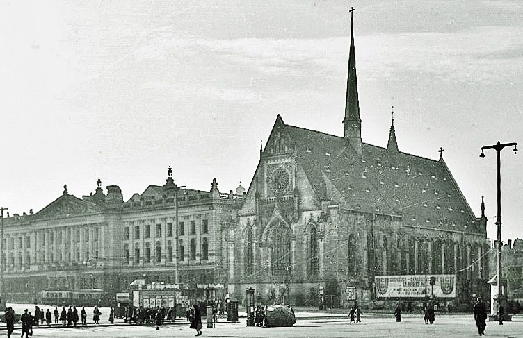 Original image description from the Deutsche Fotothek Augustusplatz mit Augusteum und Universitätskirche St. Pauli